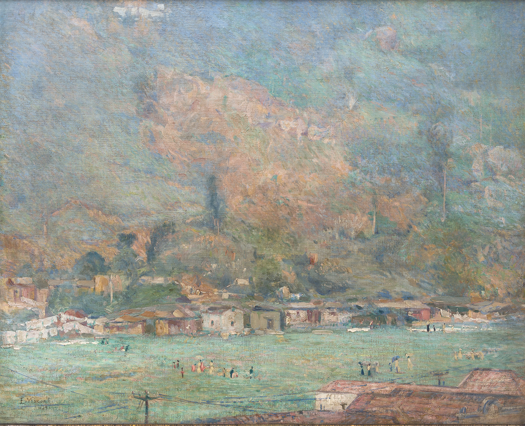 Obra do Projeto Eliseu Visconti